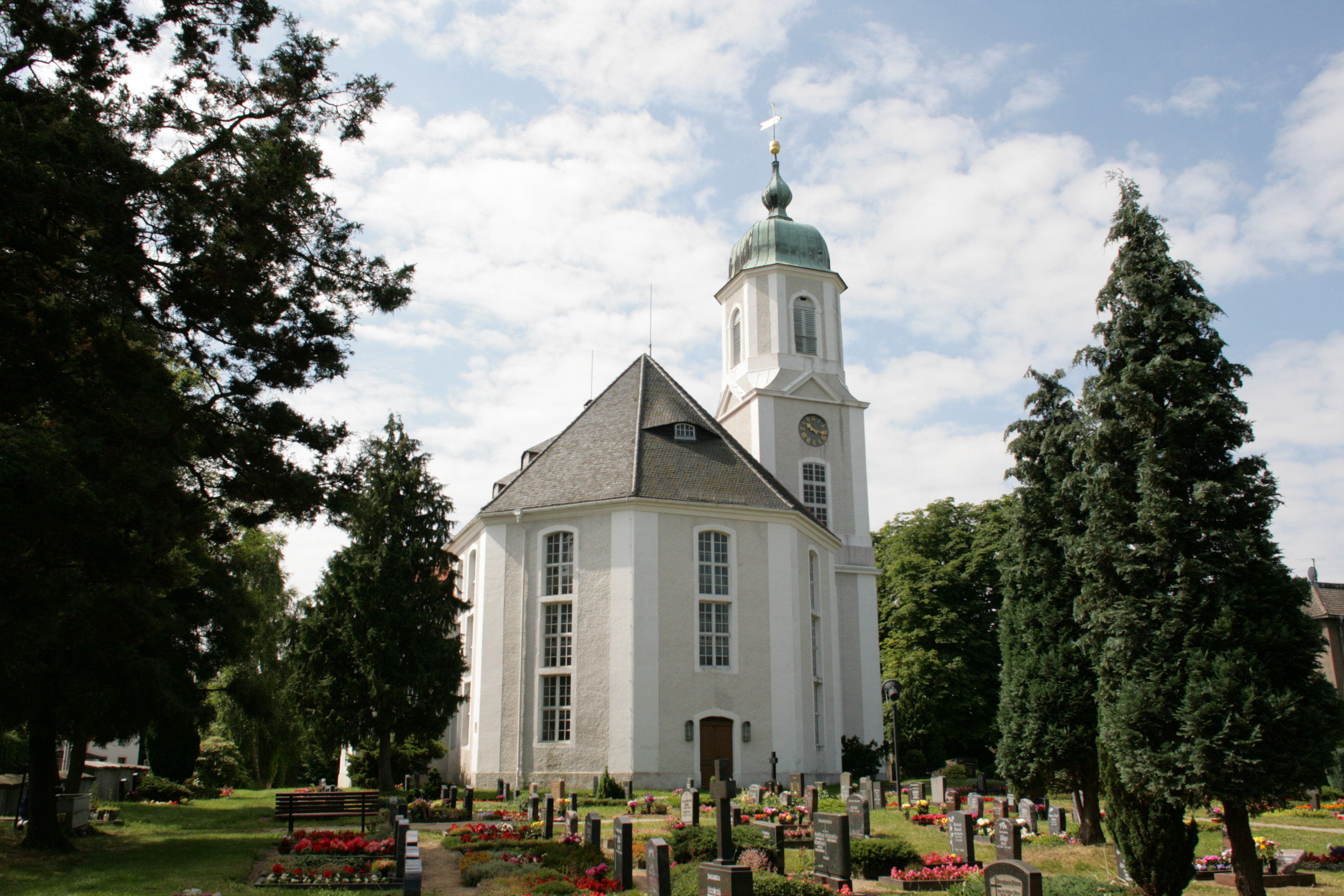 Evangelische Autobahnkirche (Parochialkirche Peter & Paul), Taucherwaldstraße 73, Uhyst am Taucher, Burkau